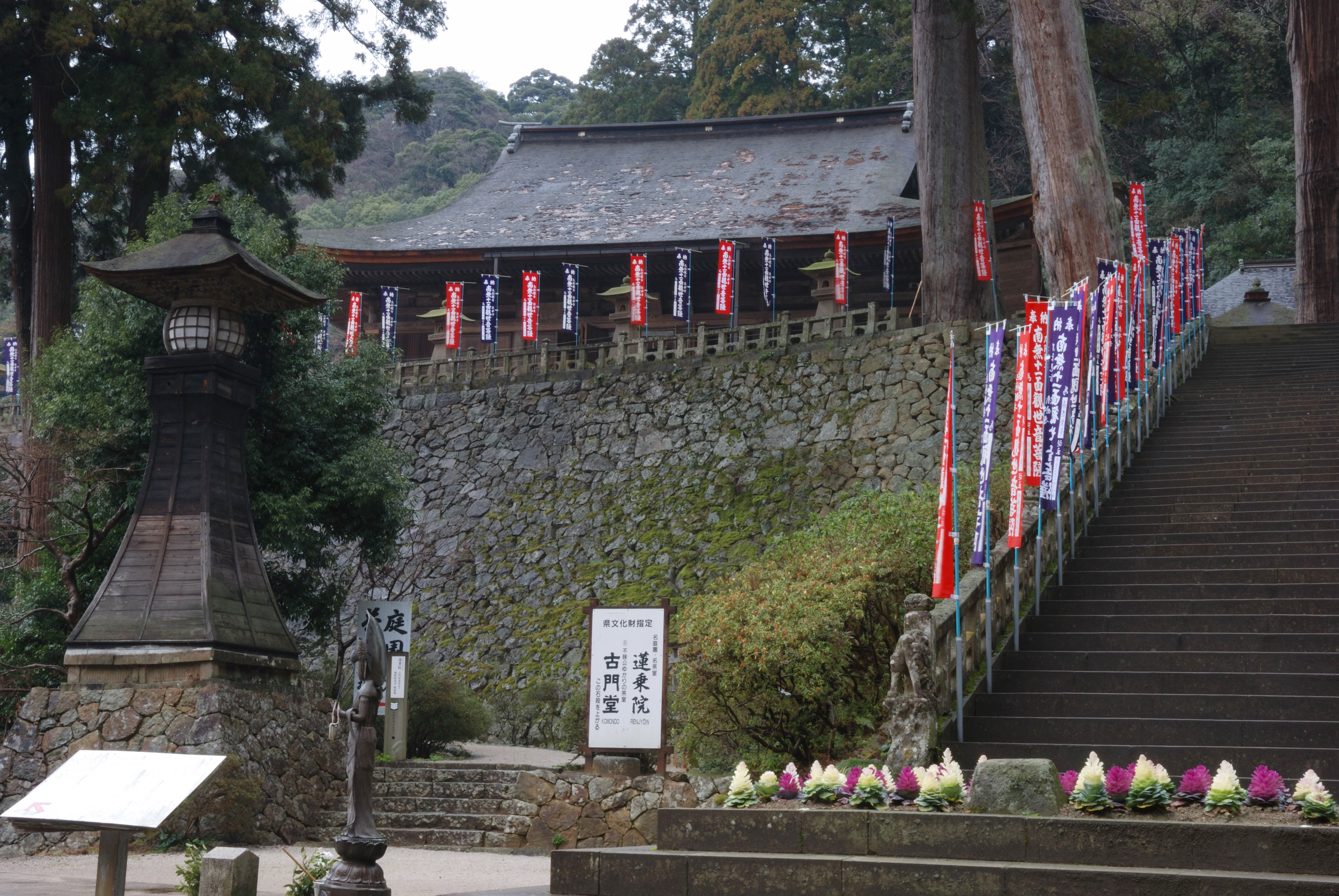 Kiyomizu-dera konpondo